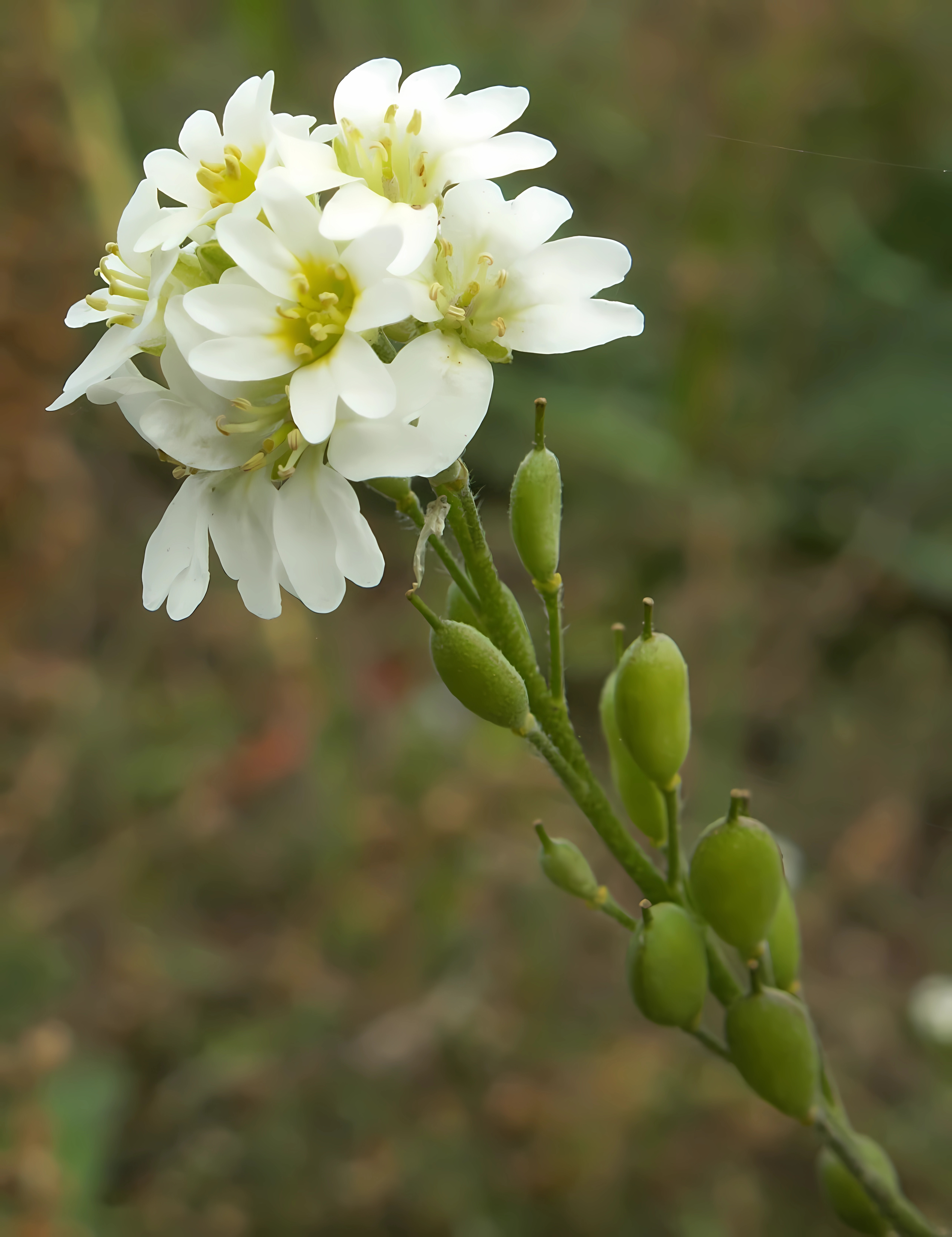 Berteroa incana. Fruit, flowers. Szczecin Majowe, NW Poland